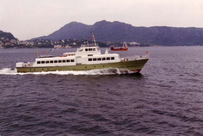 MS Fjordprins1 Nordgående på byfjorden i Bergen